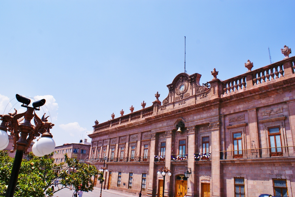 Palacio de Gobierno de San Luis Potosí.